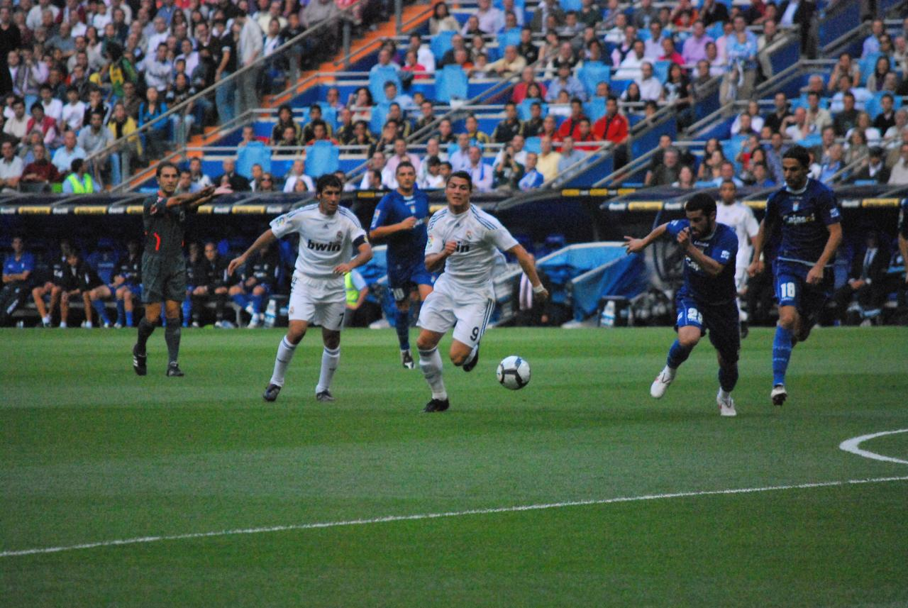 Real Madrid 5 - Xerez 0 20/9/09